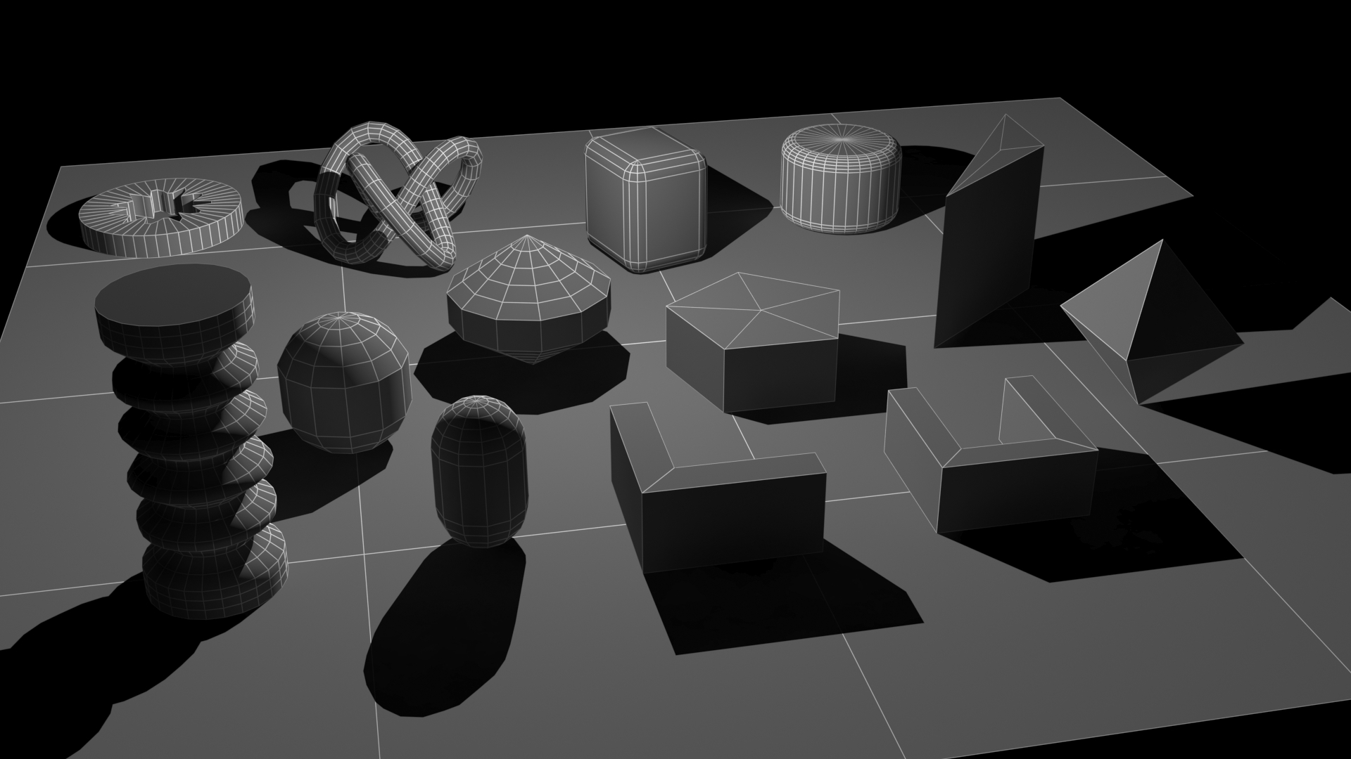 Geometrija "Razširjeih primitivnih teles"